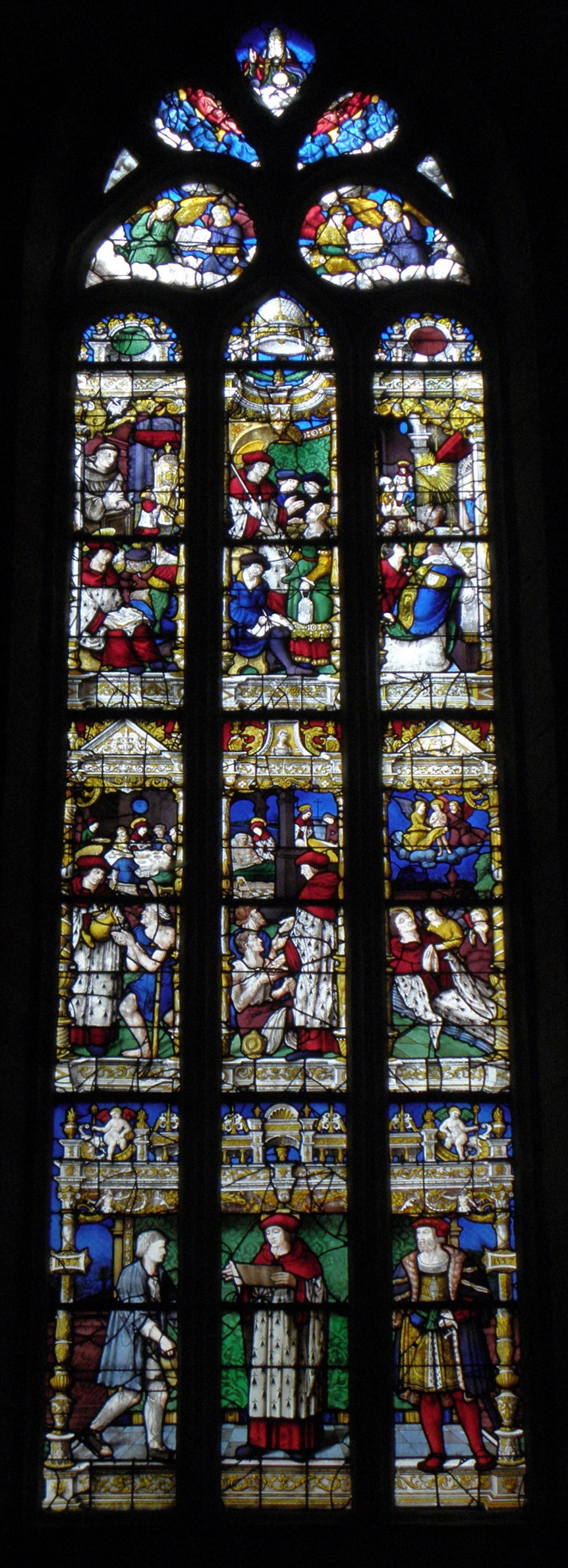 Baie 7 de l'église Saint-Mathurin de Moncontour (22). Vie de Saint-Yves.